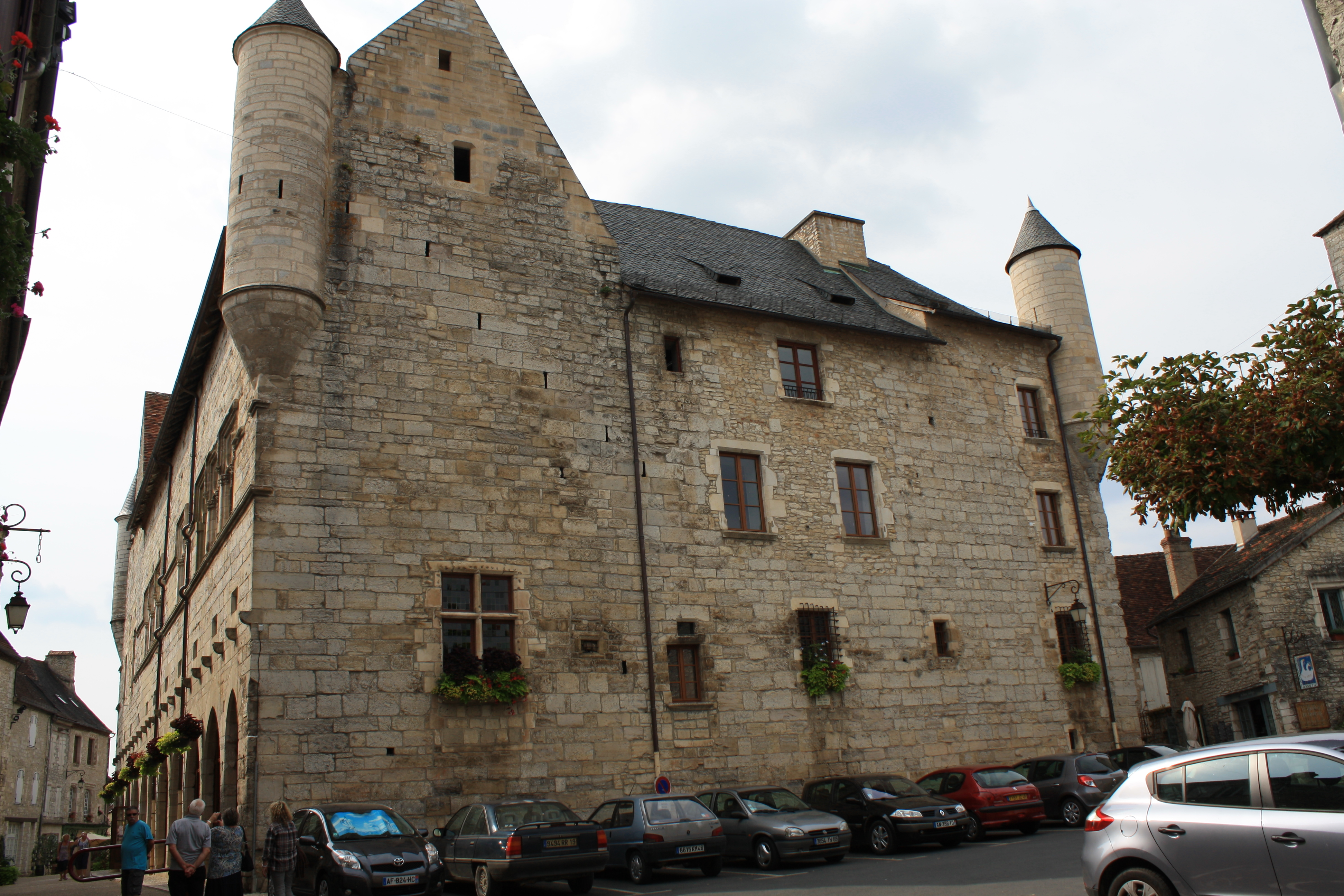 Hôtel de ville de Martel, Place du MarchéRue de SenlisRue Tournemire (ClasséClasséInscrit, 190619261926) .